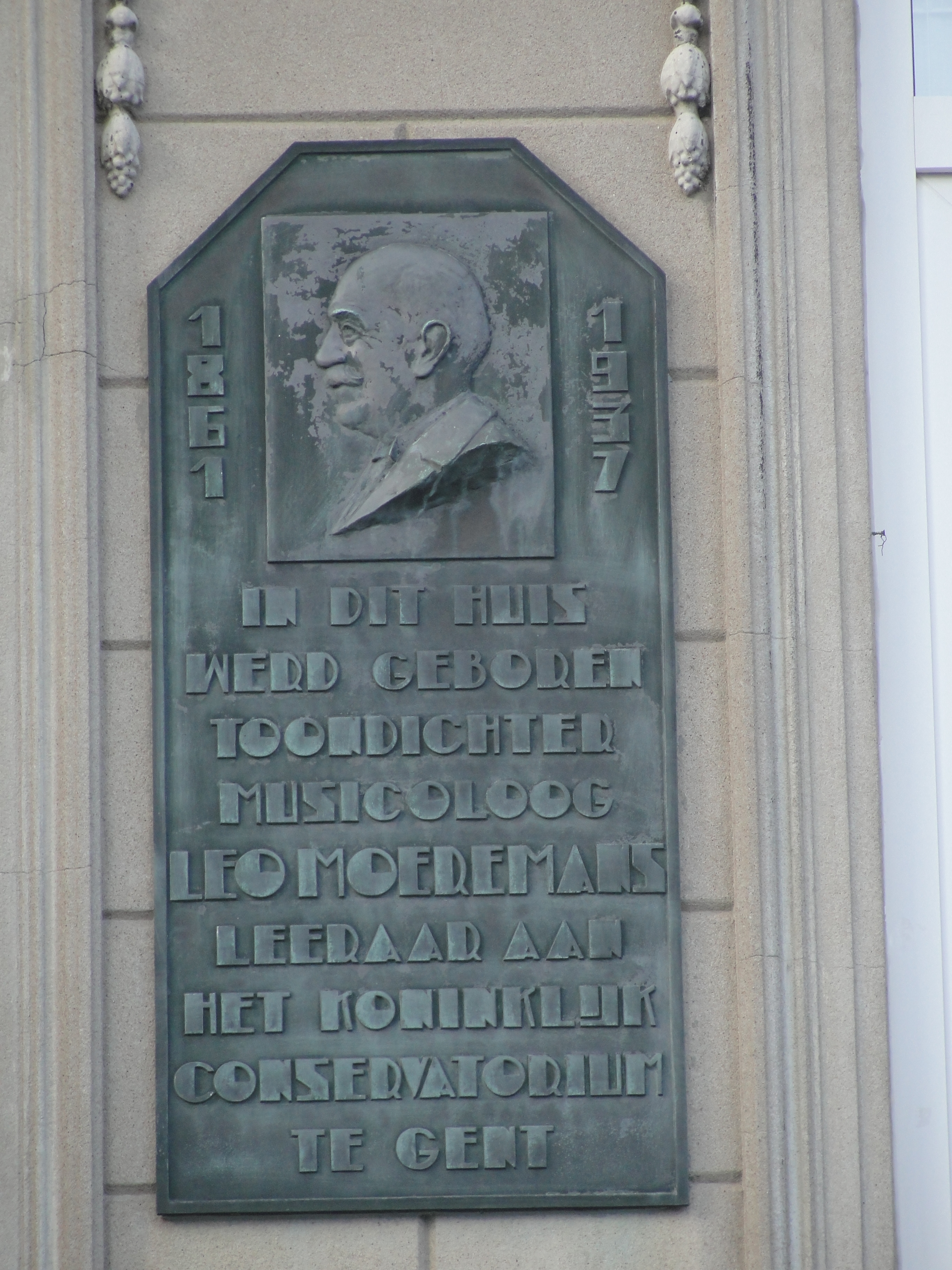 Plaquette op het geboortehuis van Léon Moeremans (1861-1937), componist. Langemuntstraat 12, Ninove